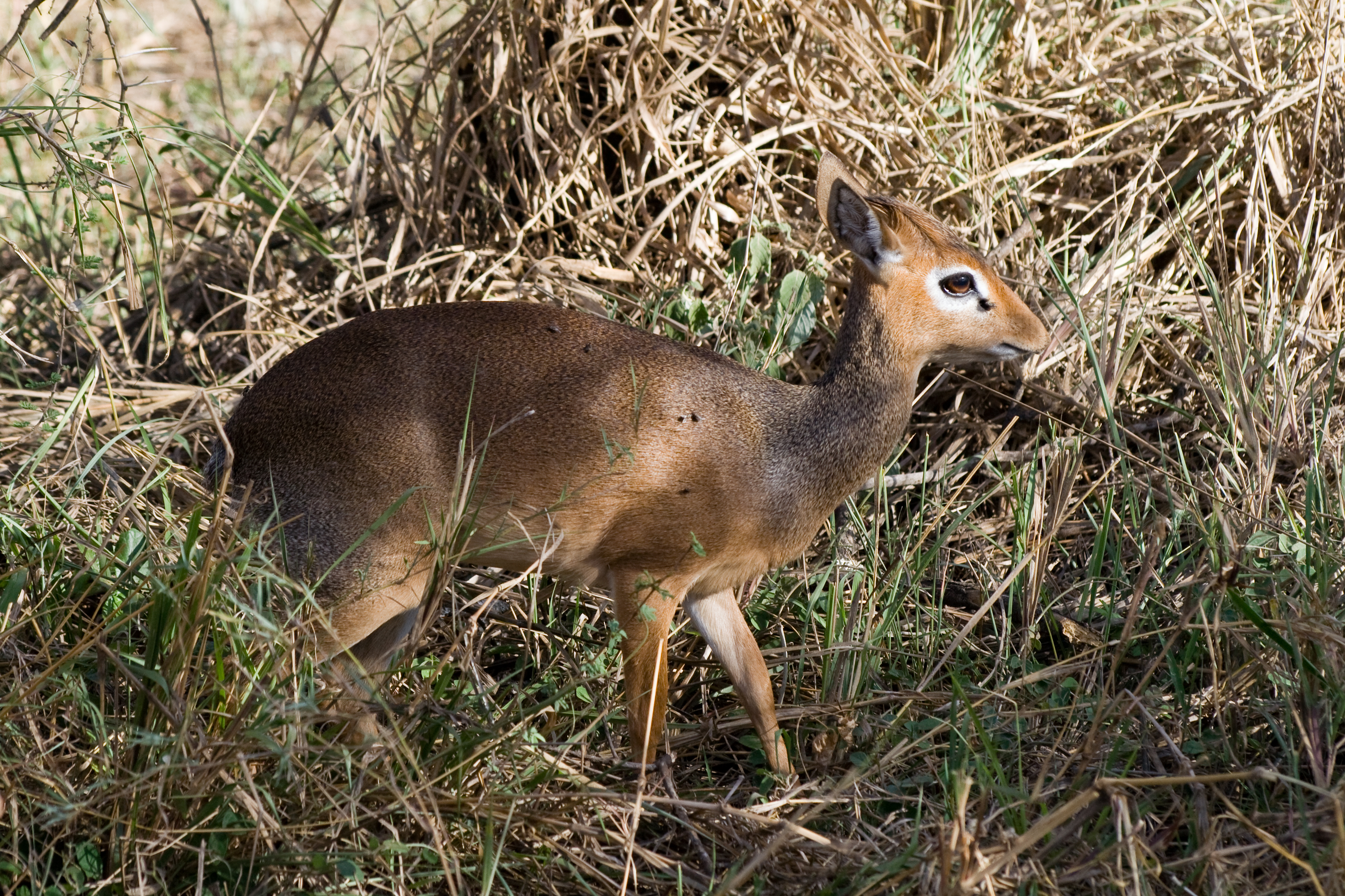 Madoqua kirkii, Serengeti National Park, Tanzania